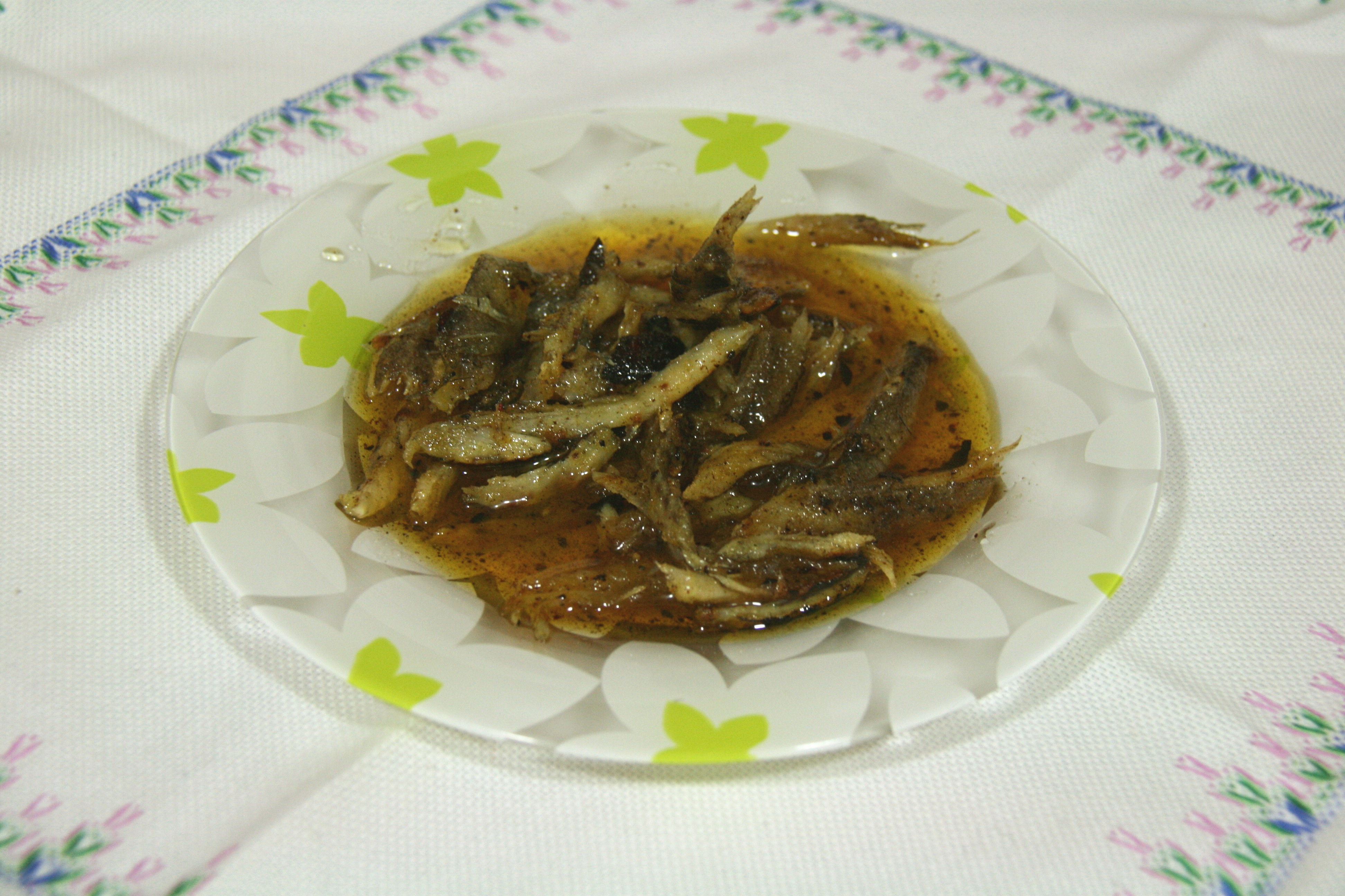 Salsas pericana